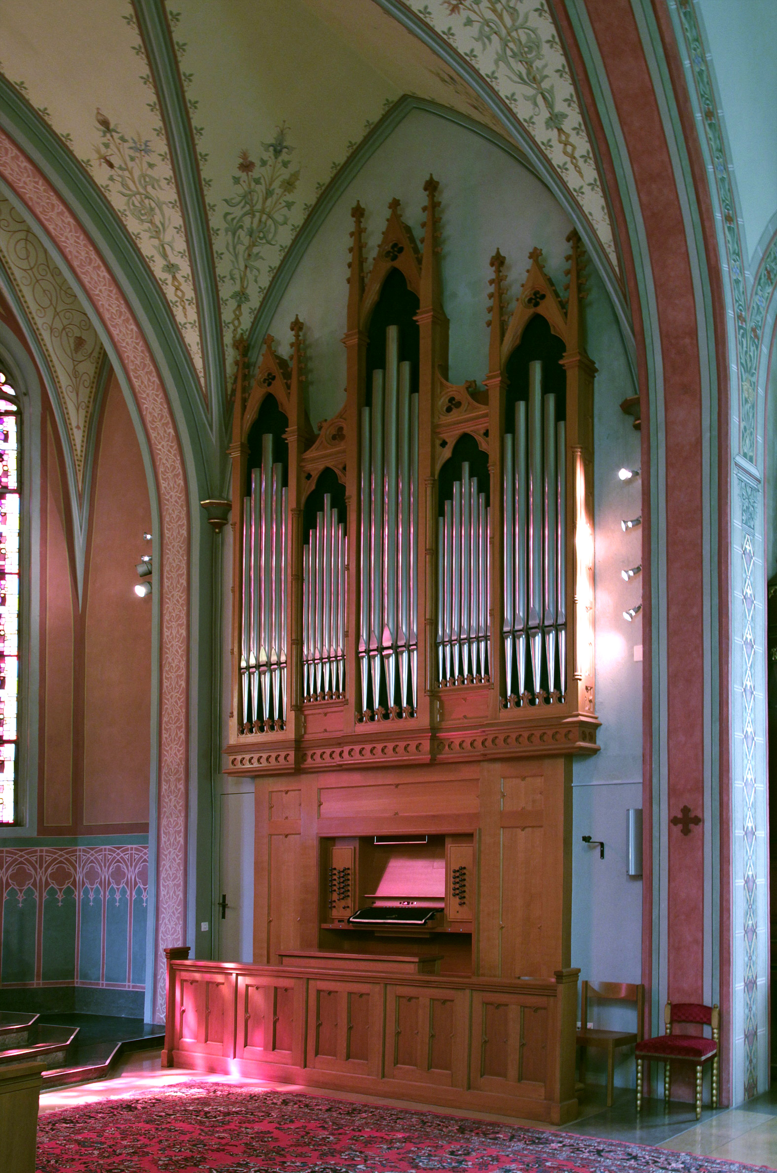 Römisch-katholische Kirche St. Peter und Paul (Zürich)